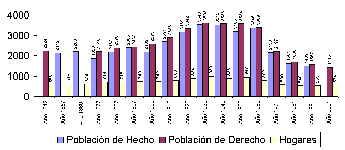 Población de Valenzuela (1842-2001). Según los datos disponibles en la web del Instituto Nacional de Estadística.